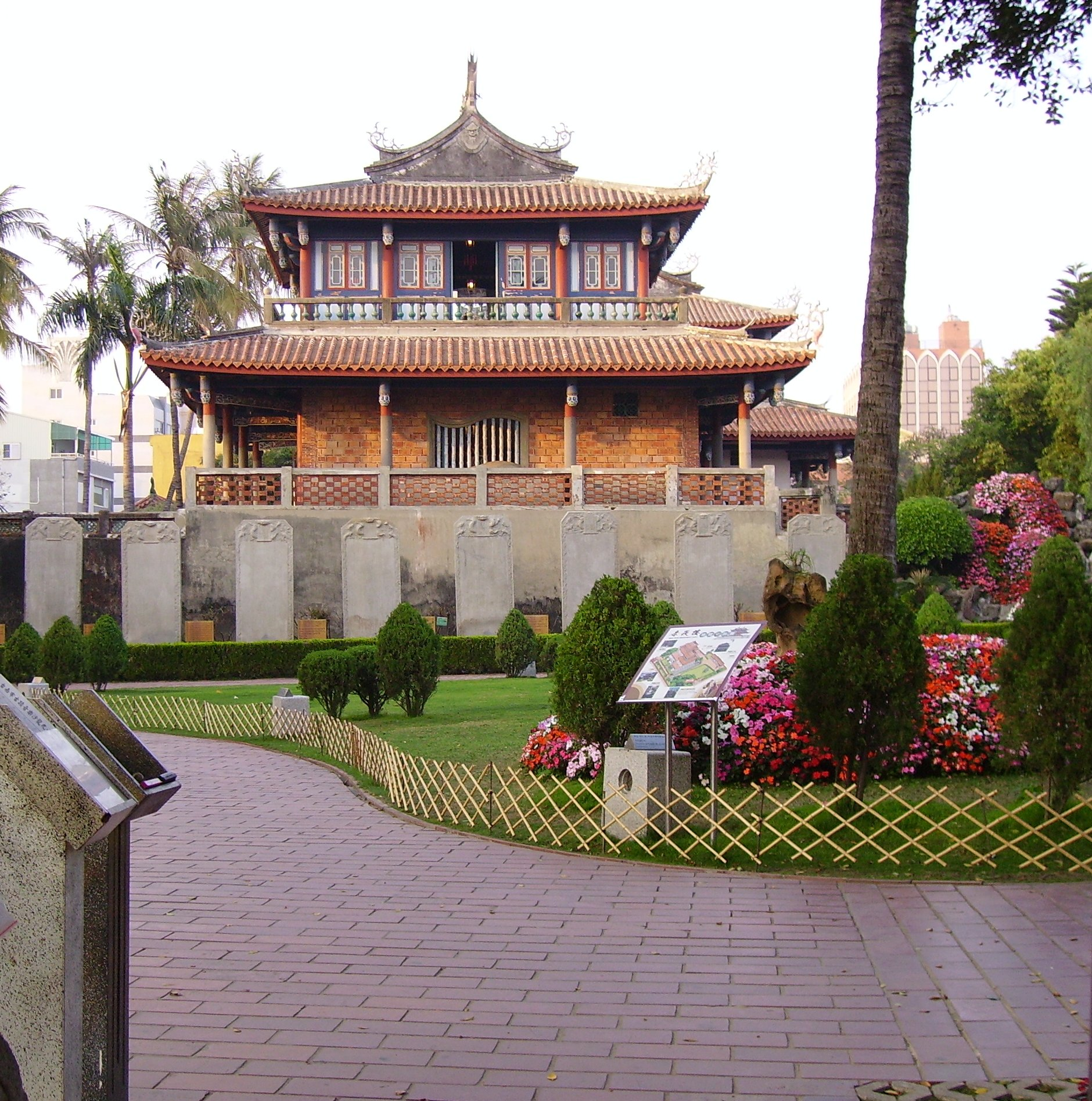 台南赤崁樓 2006.03